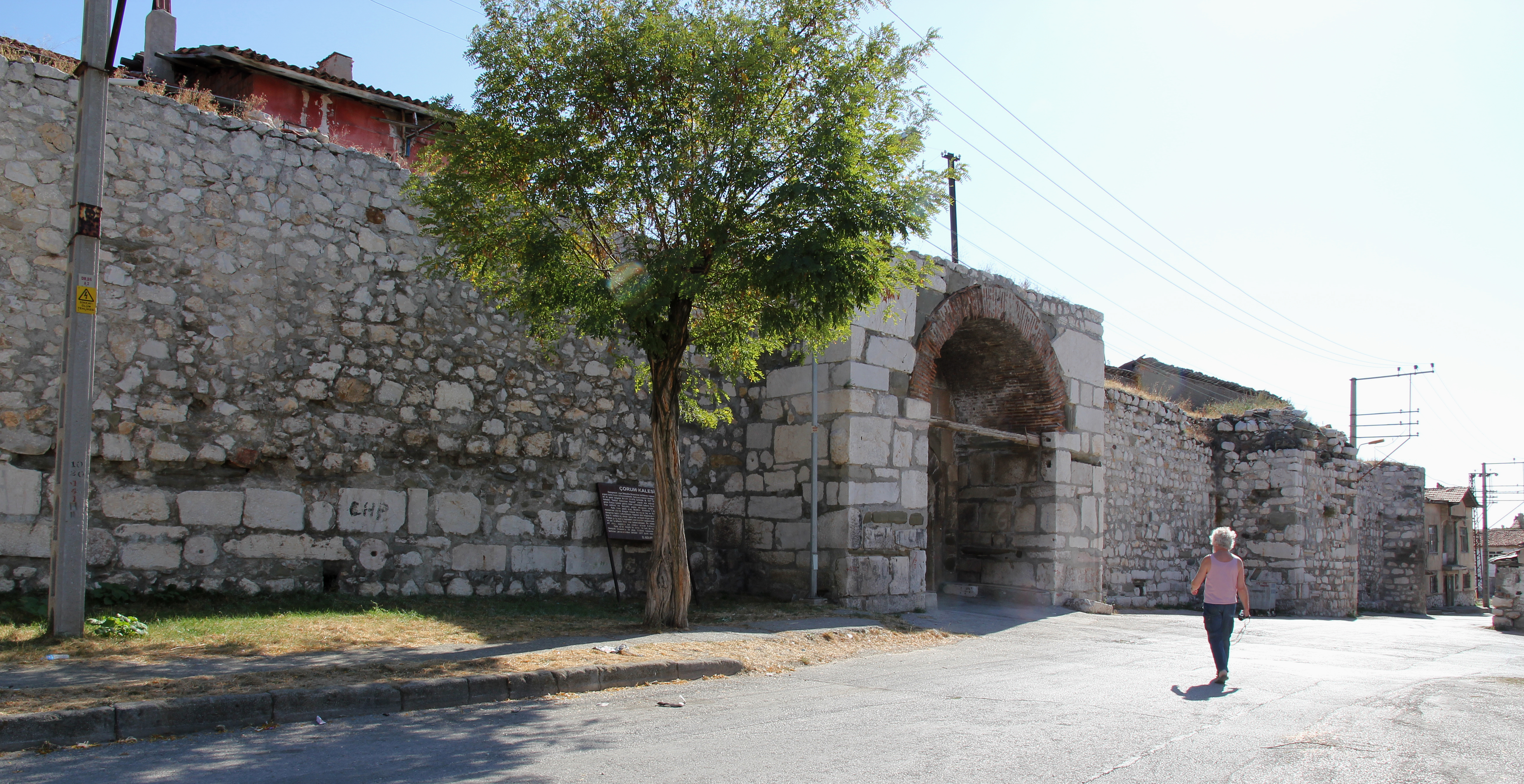 Festung von Çorum, Zentraltürkei, Nordseite